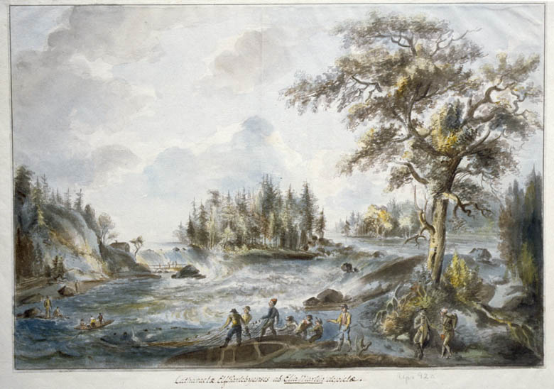 Vy över Älvkarlebyfallen på 1790-talet. Akvarellerad pennteckning av Elias Martin.